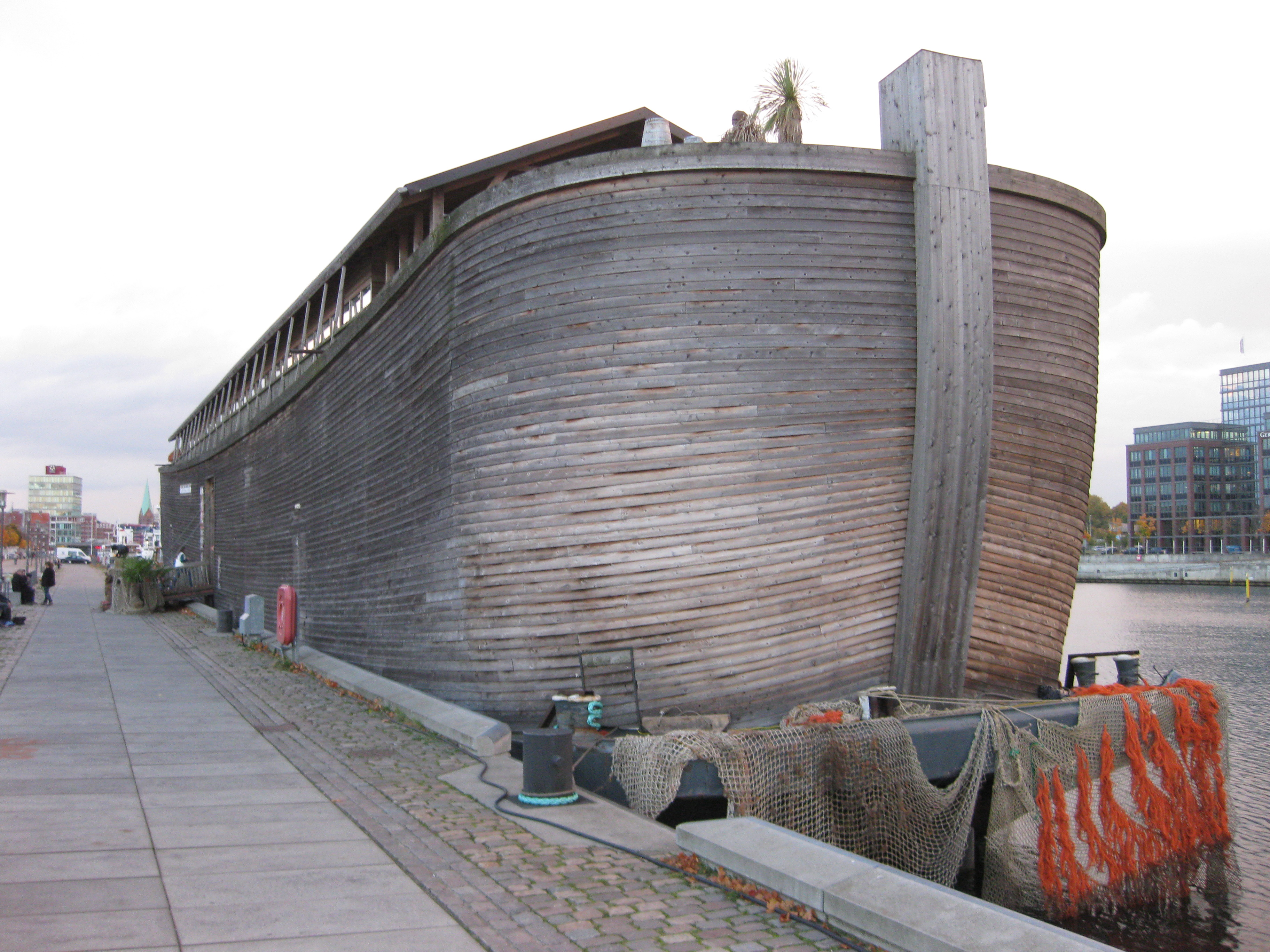 Bugansicht des Nachbaus der Arche Noah in Kiel